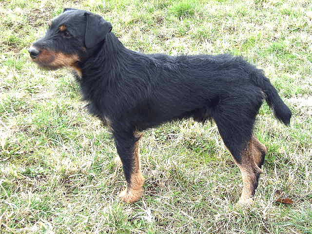 Jagdterrier